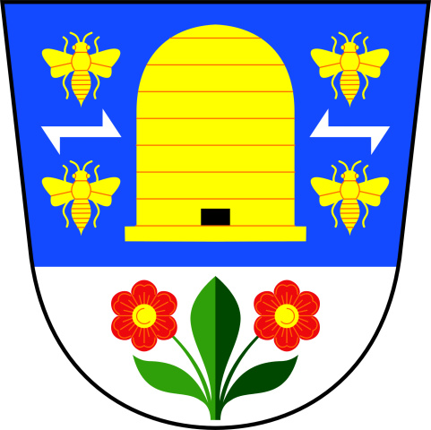 znak obce Vlachova Lhota